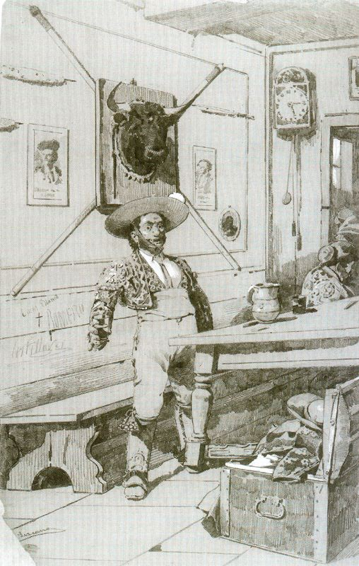 Antes de la corrida. 1883. Obra de Ángel Lizcano Monedero